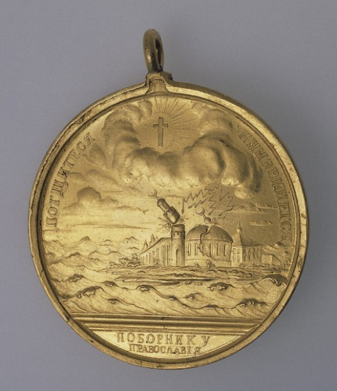 Эта медаль «Поборнику православия» в 20 червонцев выпущена в период Первой Архипелагской экспедиции 1769-1775 годов. Ни проекта, ни документов на изготовление этих медалей в архивах не сохранилось. В публикациях Ю.Б. Иверсена они названы «Медалями на ныняшний военный случай», указано, что чеканили их из золота и разного достоинства – в 20,15,12,5 и 3 червонца. Эта медаль на 20 червонцев найдена русскими водолазами на дне Чесменской бухты в 1889 году. Предположительно принадлежала Федору Григорьевичу Орлову, брату командующего экспедицией Алексея Григорьевича Орлова, утеряная в момент Чесменской битвы в 1770 году.